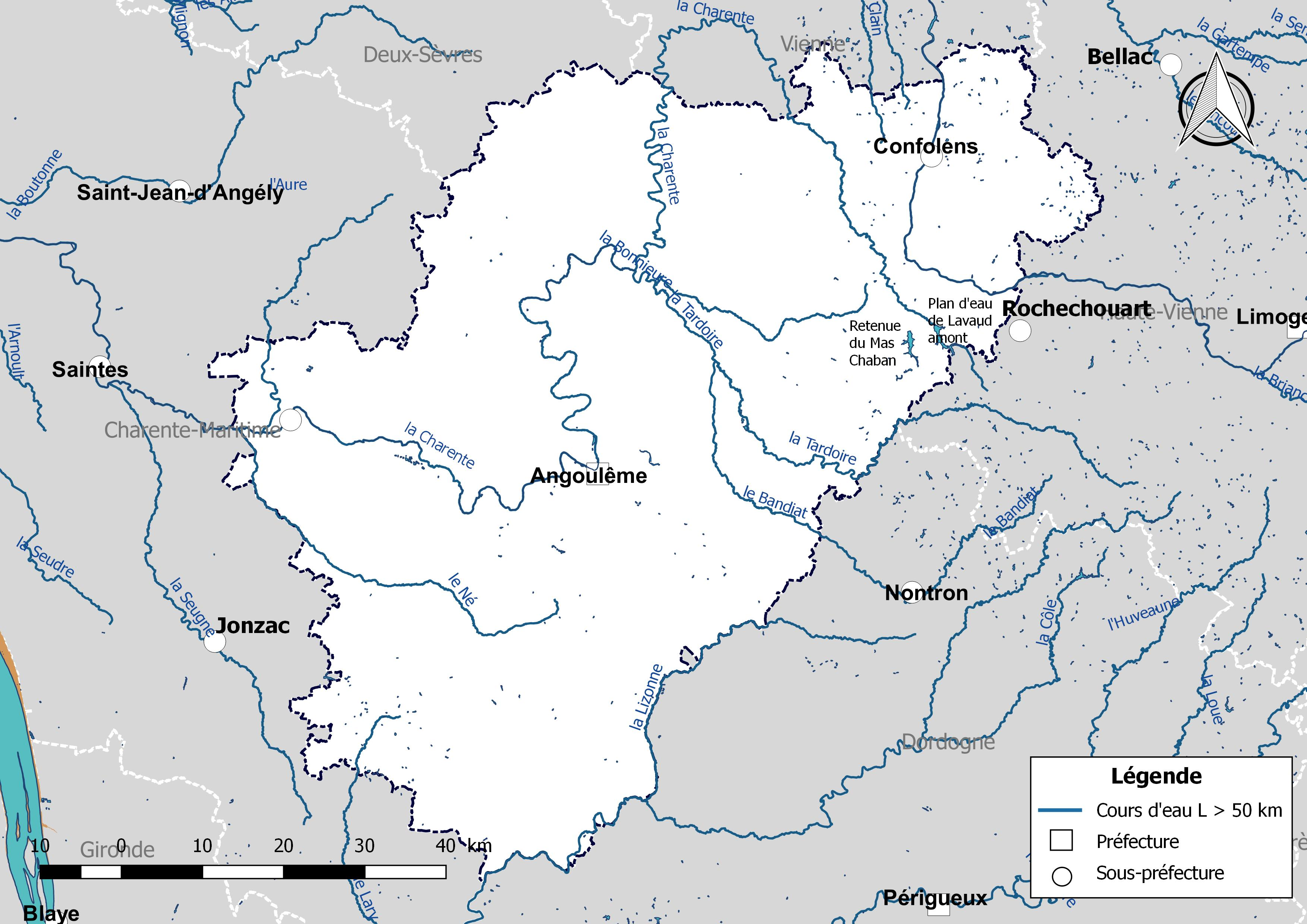 Carte des cours d'eau de longueur supérieure à 50 km drainant le département de le Charente (France).